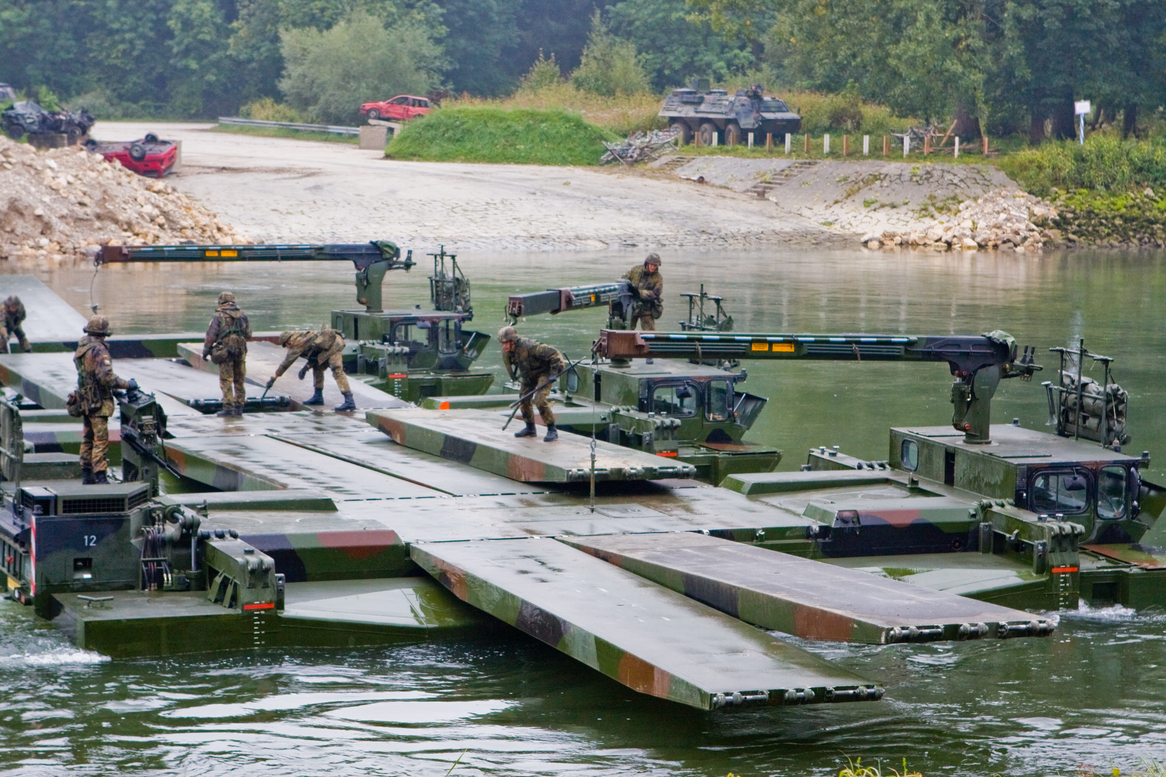 M3G mobile ferry